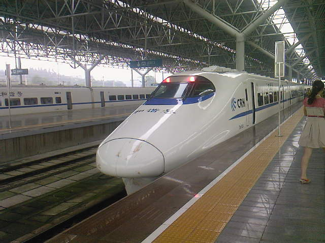 摄于2012年7月1日，汉宜铁路汉口至宜昌东首发车抵达宜昌东站后拍摄。